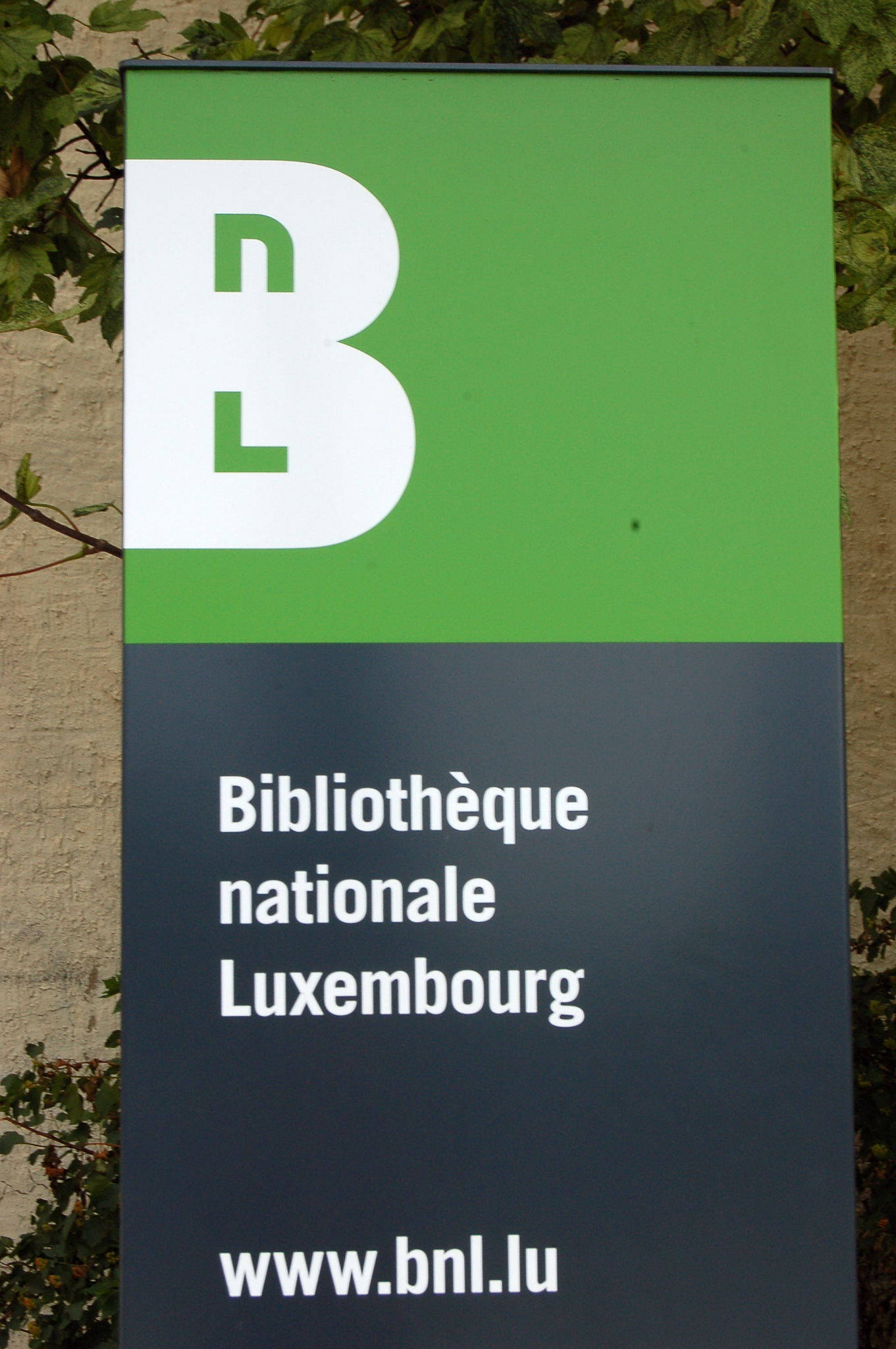 Bibliothèque nationale de Luxembourg